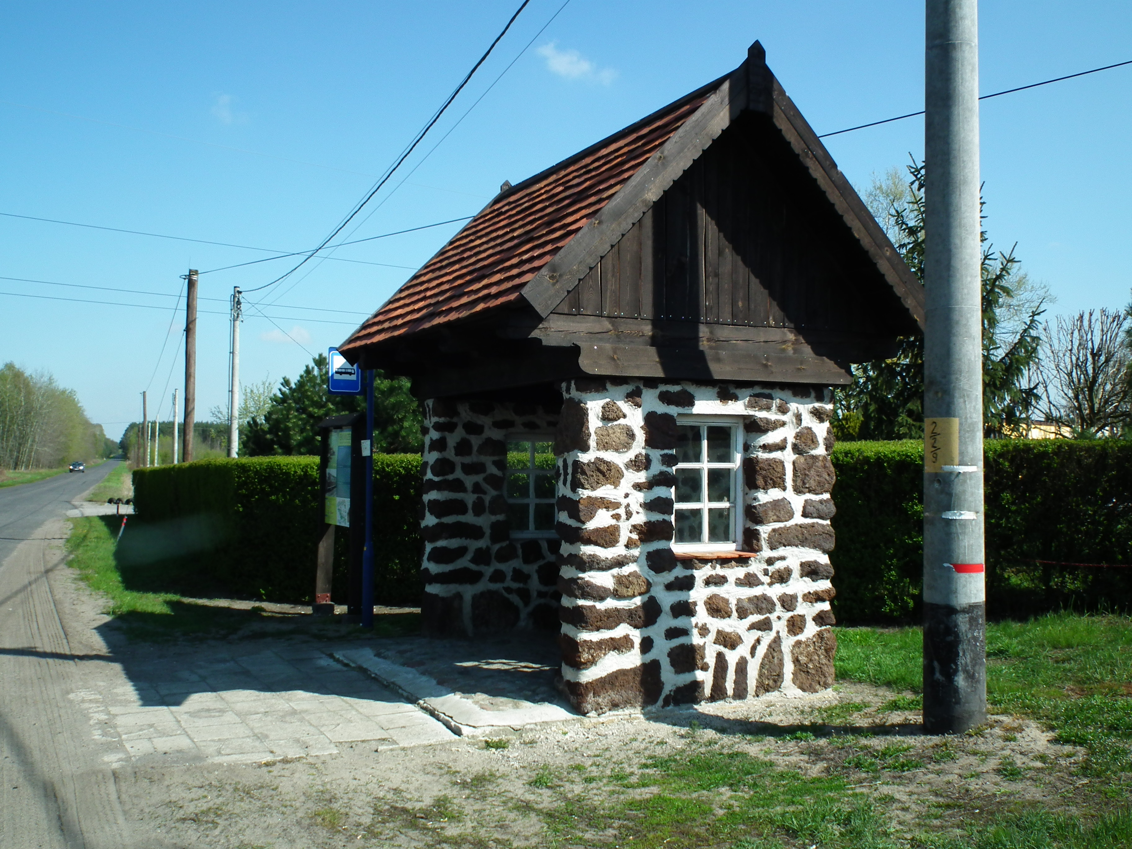 Przystanek autobusowy wykonany z rudy darniowej w Grabinie, gm. Zagórów.